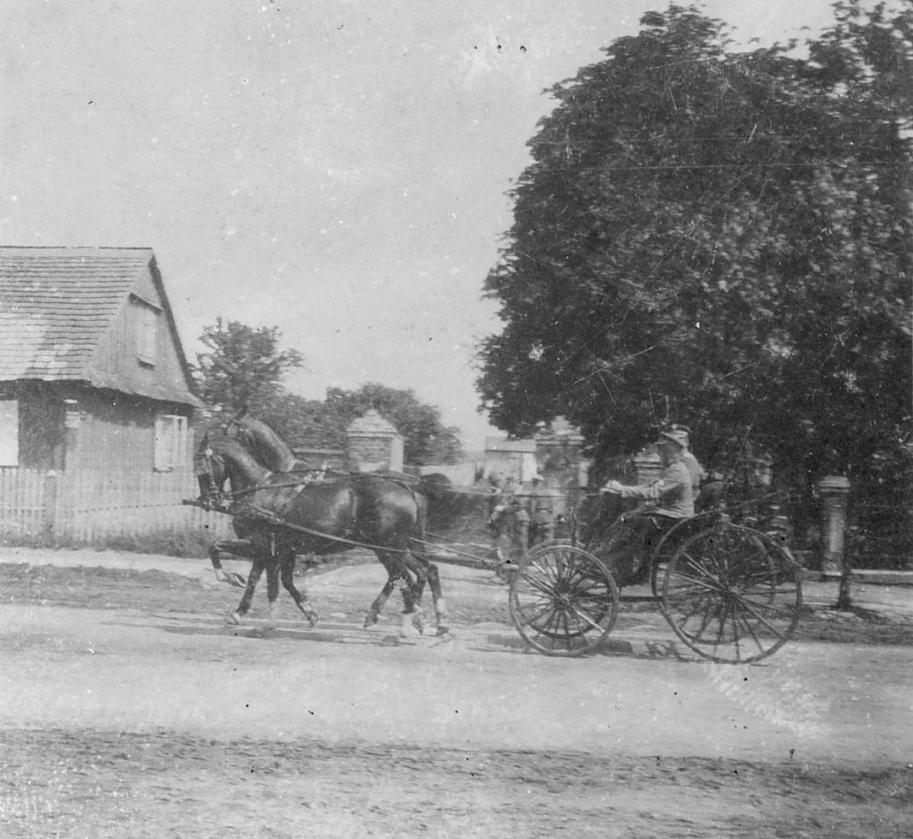 Garnizon Przasnysz, 1921r. Powóz dowódcy 7 Pułku Ułanów Lubelskich